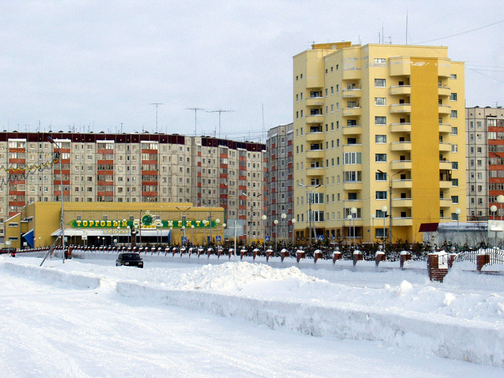 La komerca centro. La urbo Nadim, Jamalo-Neneca aŭtonoma distrikto.